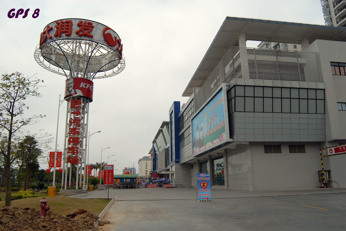 大润发国兴店2009